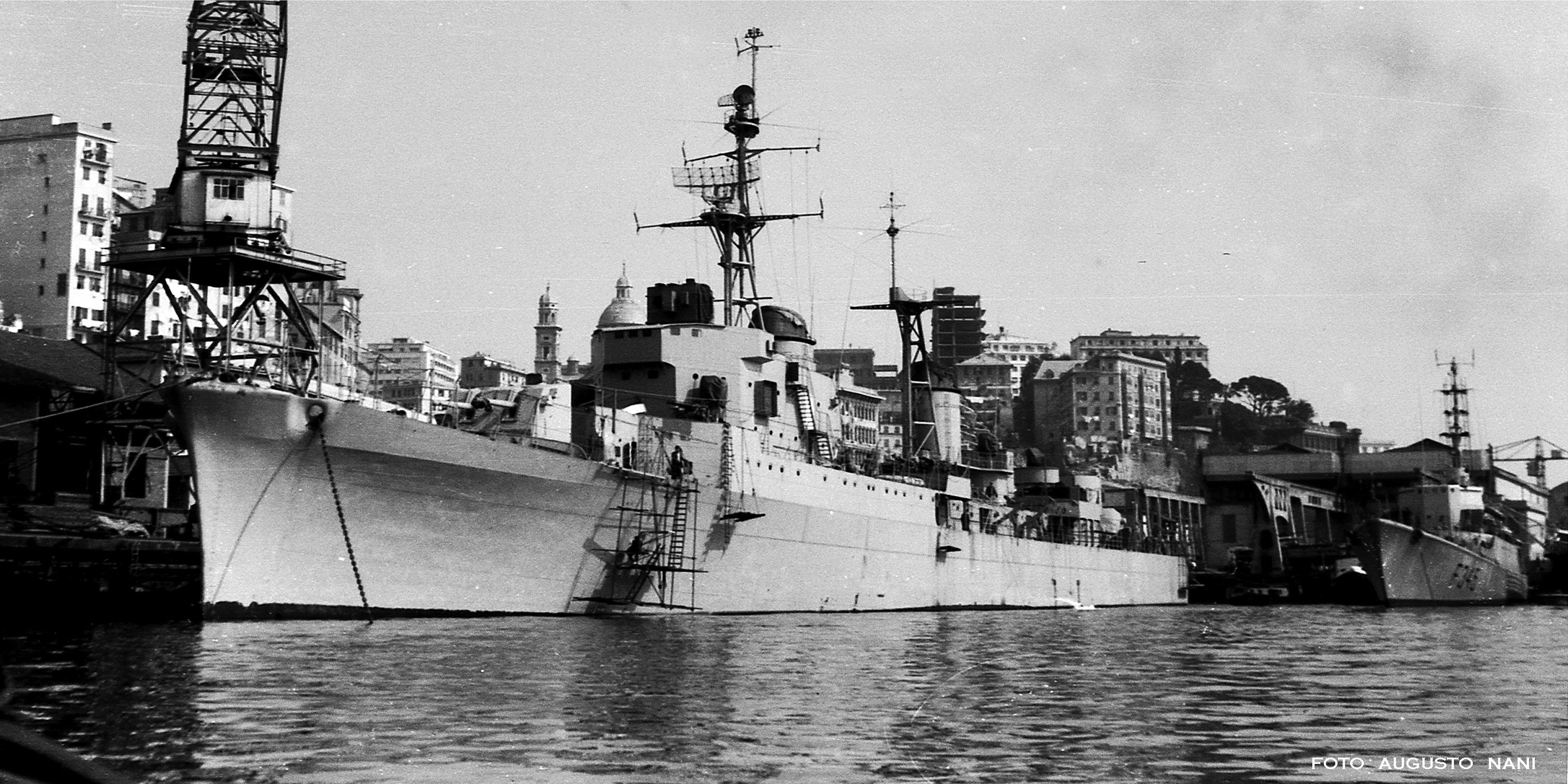 Nave San Giorgio in allestimento a Genova durante i lavori di ricostruzione